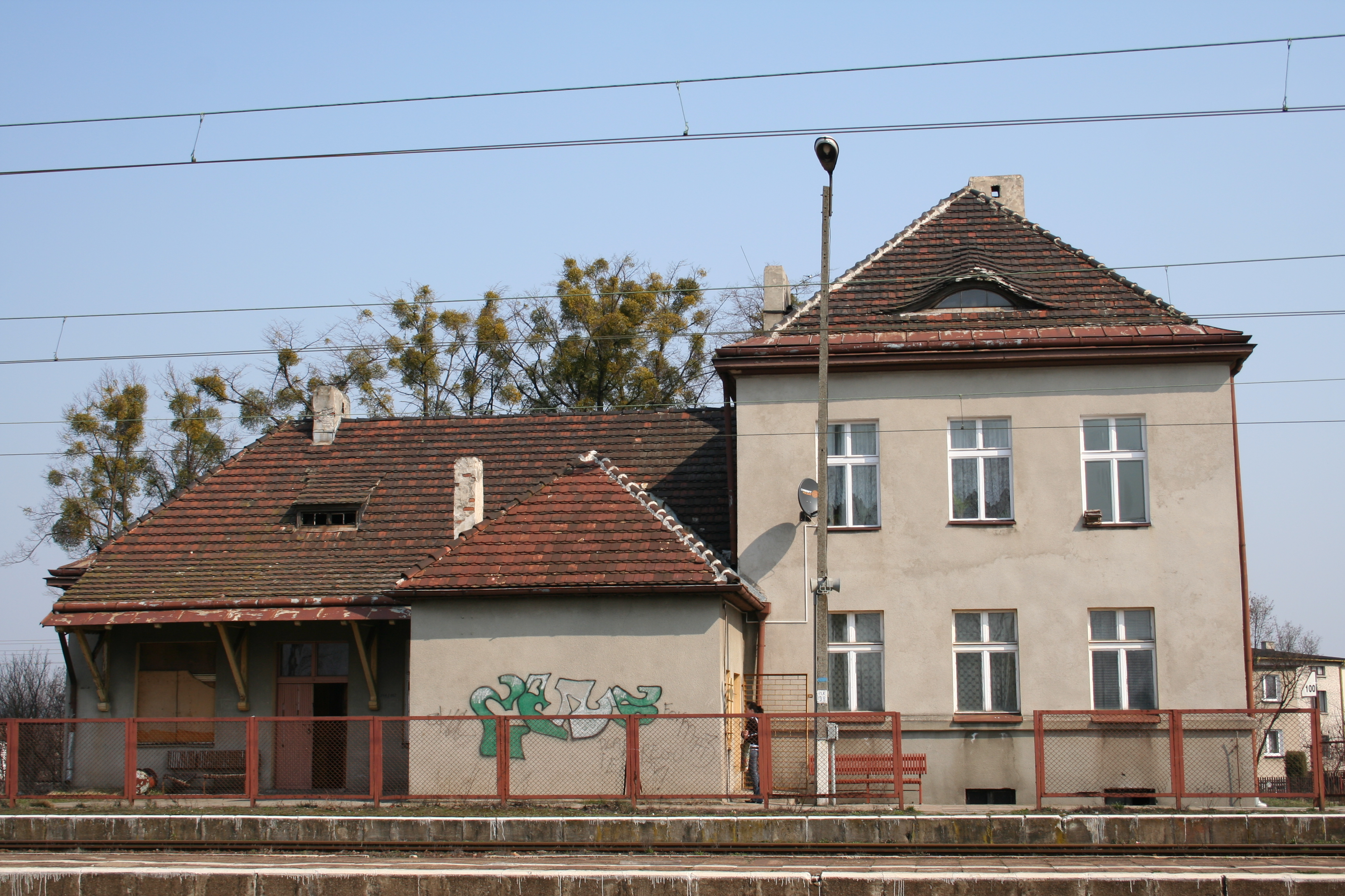 stacja PKP w Boronowie, powiat lubliniecki, województwo śląskie